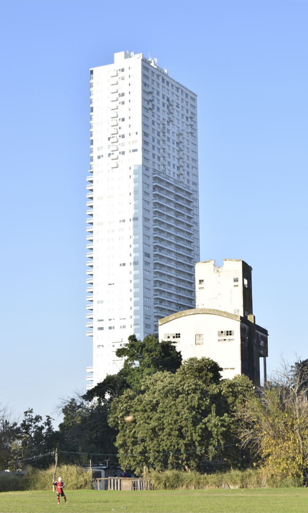 Vista de la Torre Maui I, desde el parque Scalabrini Ortiz. Rosario, Argentina.